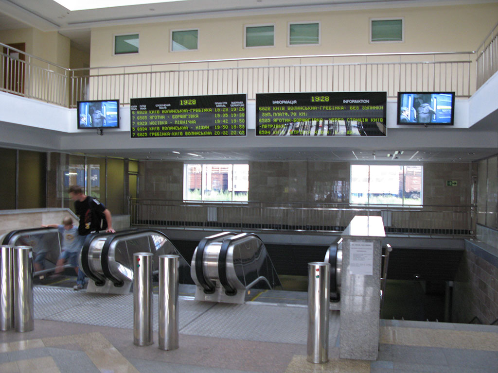 Приміський вокзал ст. Дарниця